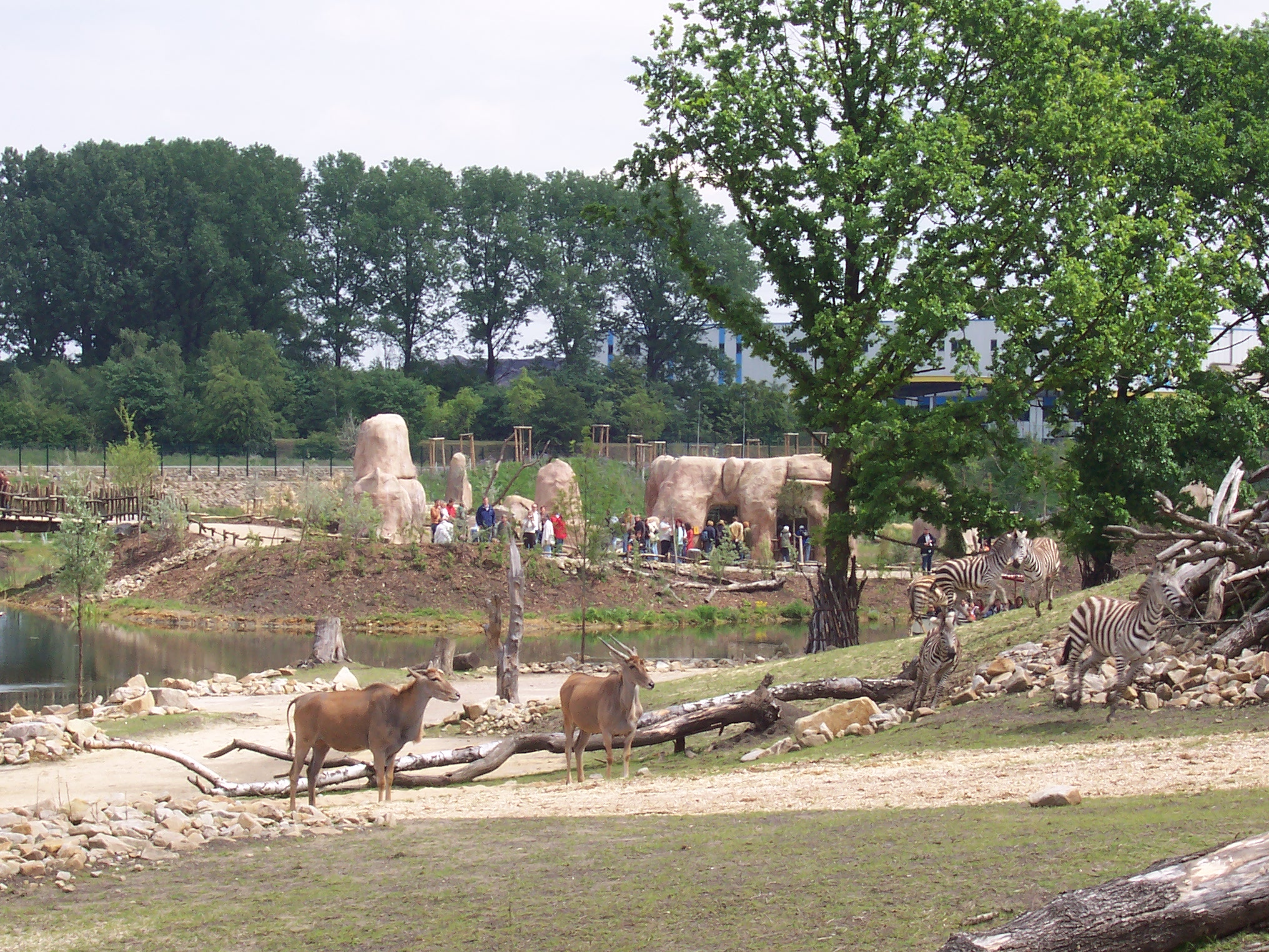 Afrika Savanne in ZOOM Erlebniswelt, Gelsenkirchen, Germany